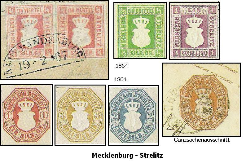 Markenbilder aus Mecklenbug-Strelitz gescannt W.Steven 09:57, 11. Jan. 2007 (CET) 2007